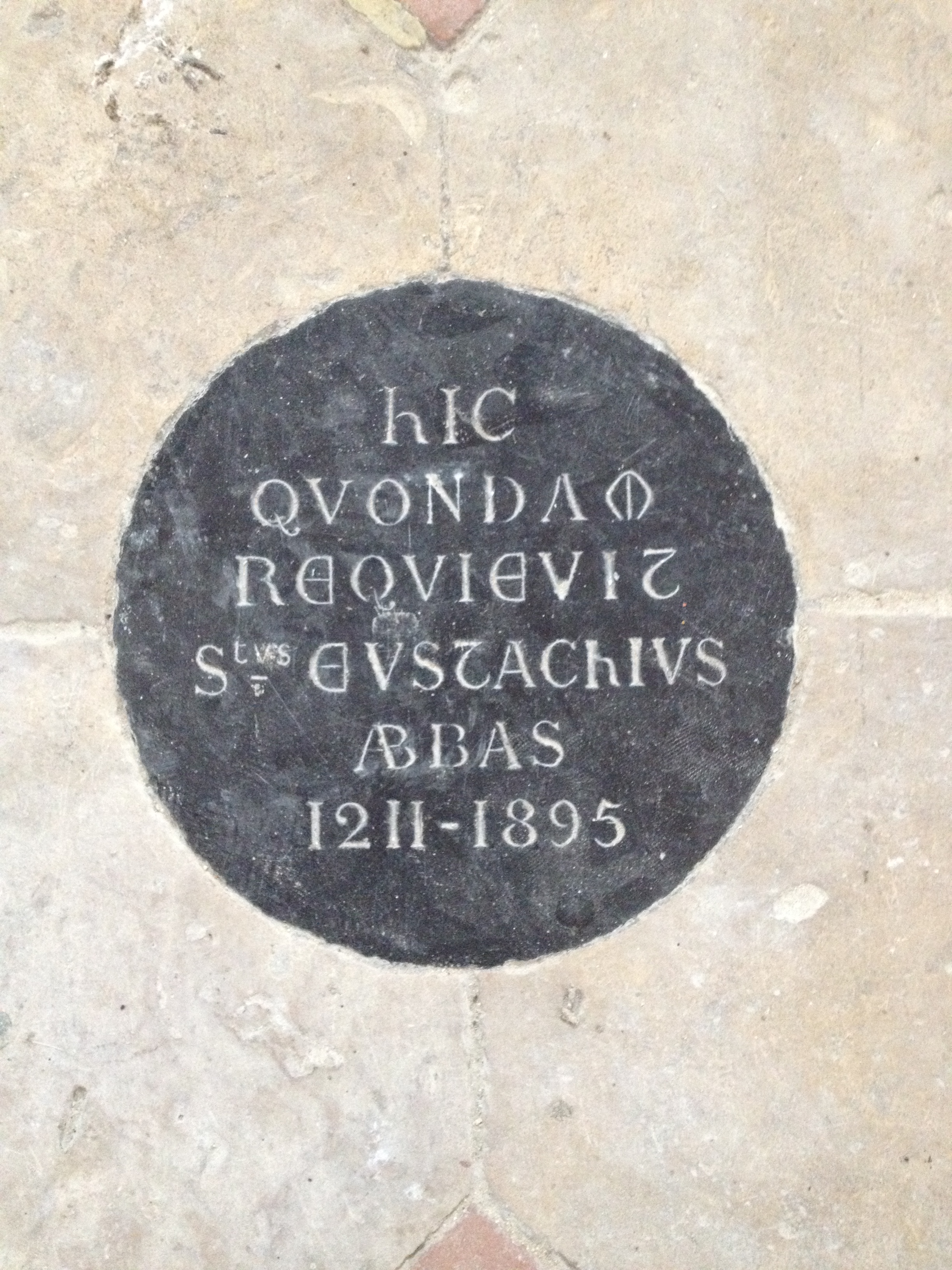 Plaque de Saint Eustache, abbé de Fly (1200-1211) dans le pavage de la nef.